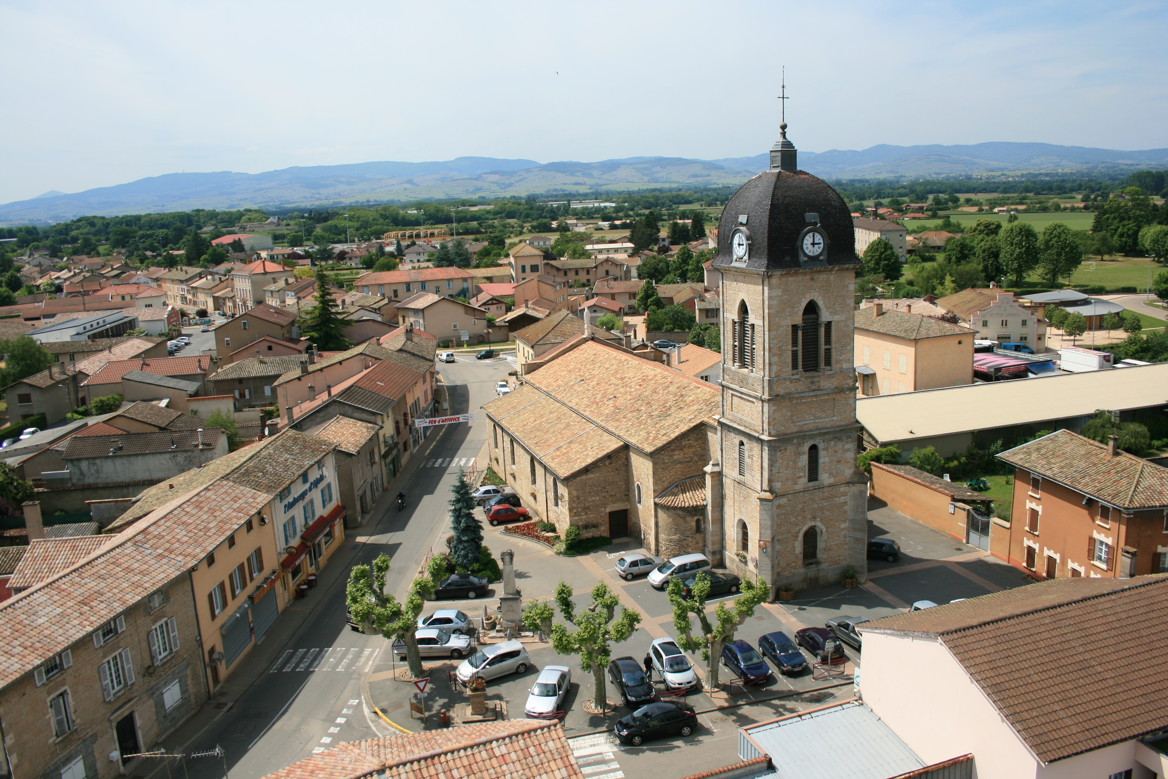 vue du ciel